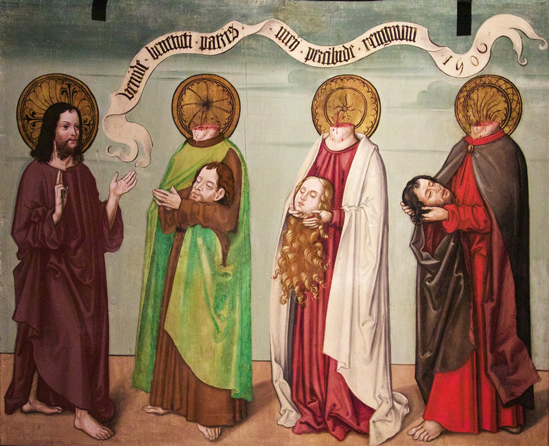 Die Zürcher Stadtheiligen Felix, Regula und Exuperantius als Kopfträger bringen Christus ihre abgeschlagenen Häupter dar und werden von ihm in den Himmel geleitet.